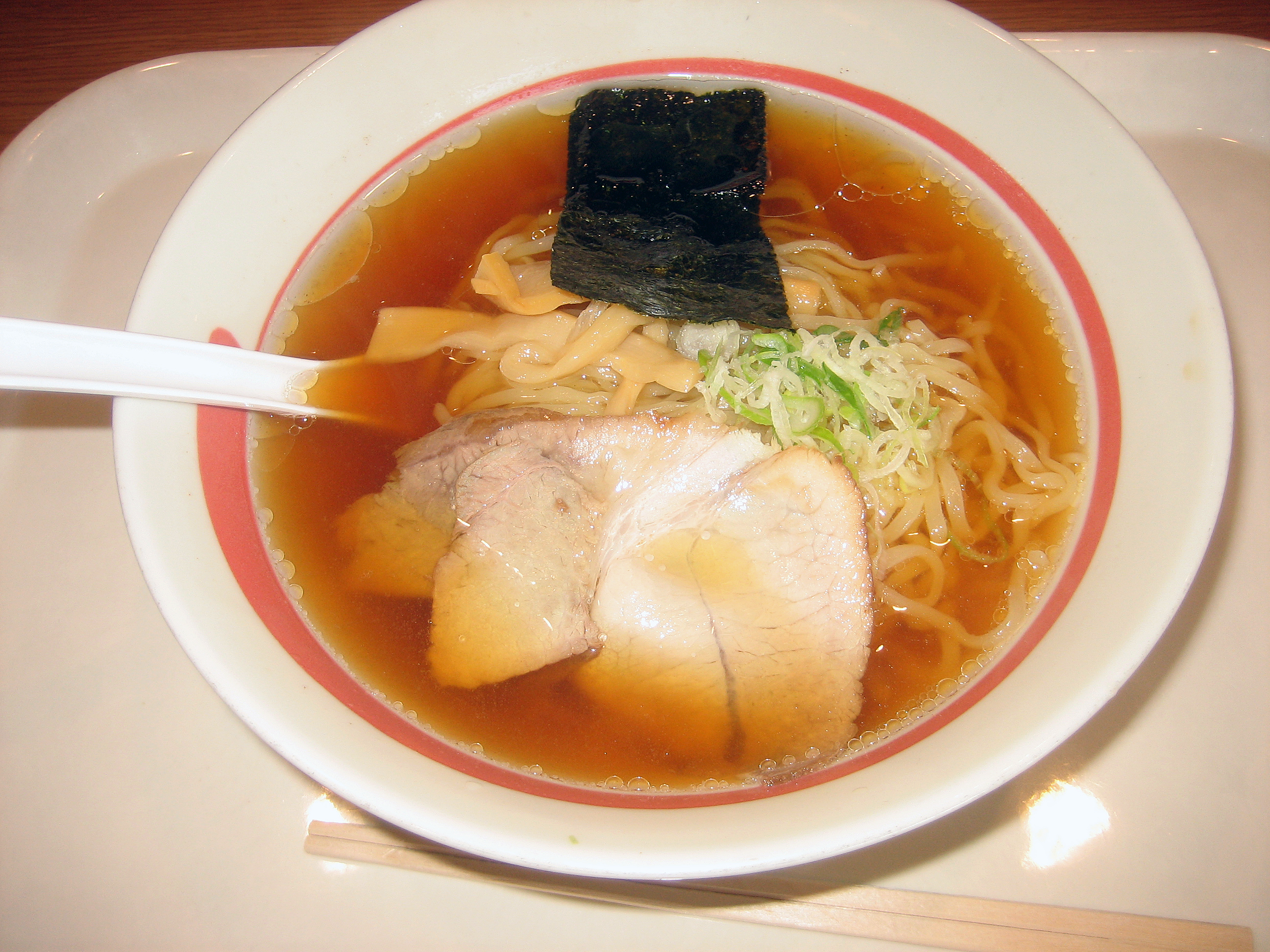 「中華そば」。ラーメンのチェーンレストランを運営している株式会社幸楽苑のメニューの一つ。